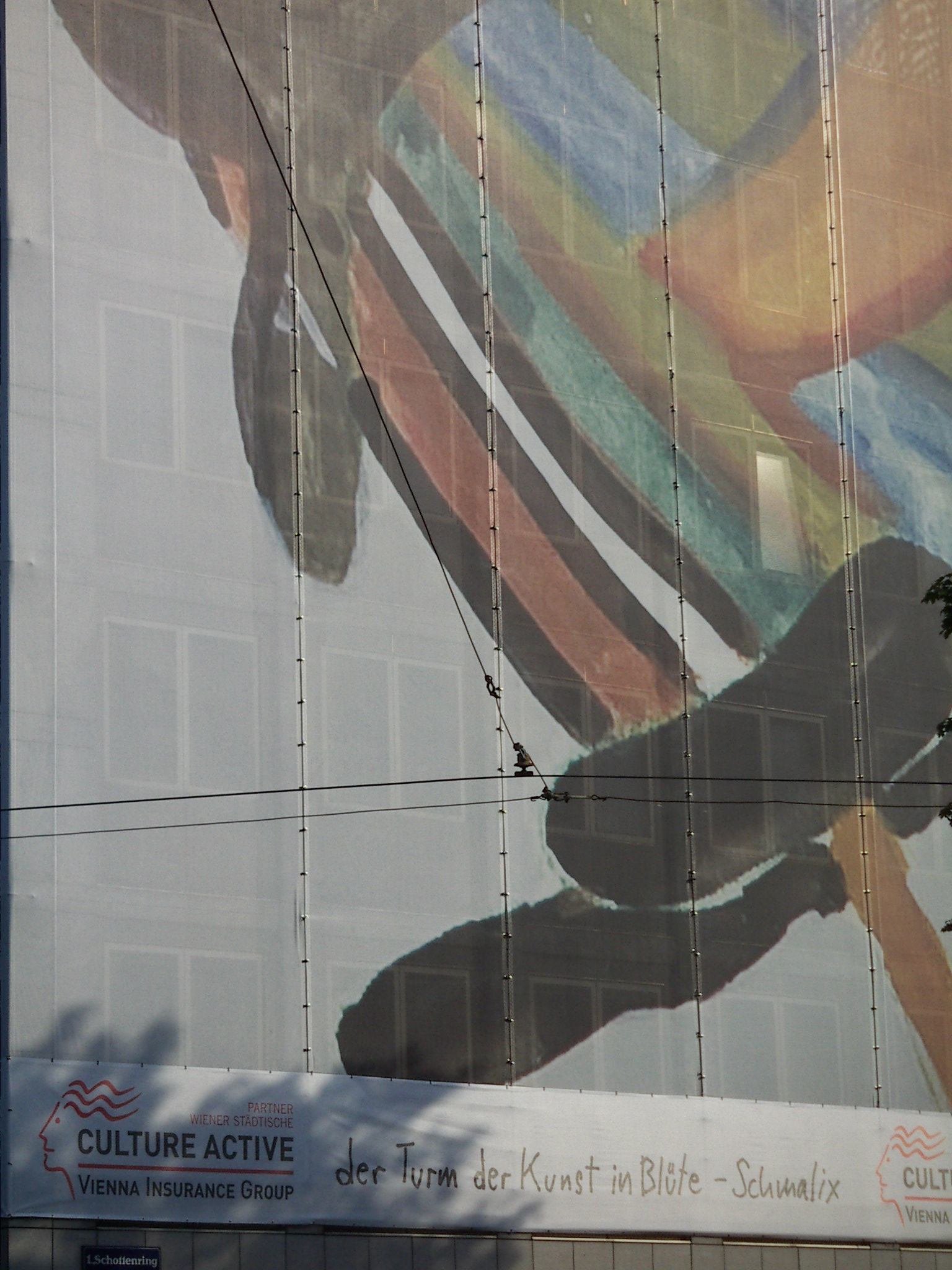 Detail Schottenring, der Turm der Kunst in Blüte - Schmalix